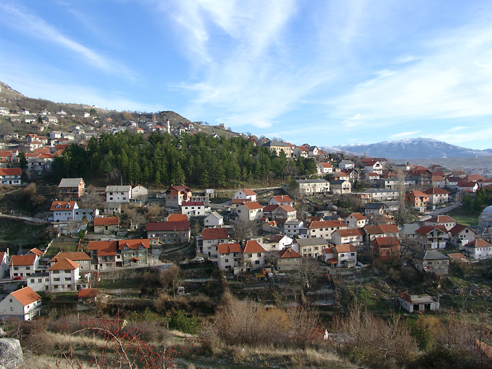 Livno.